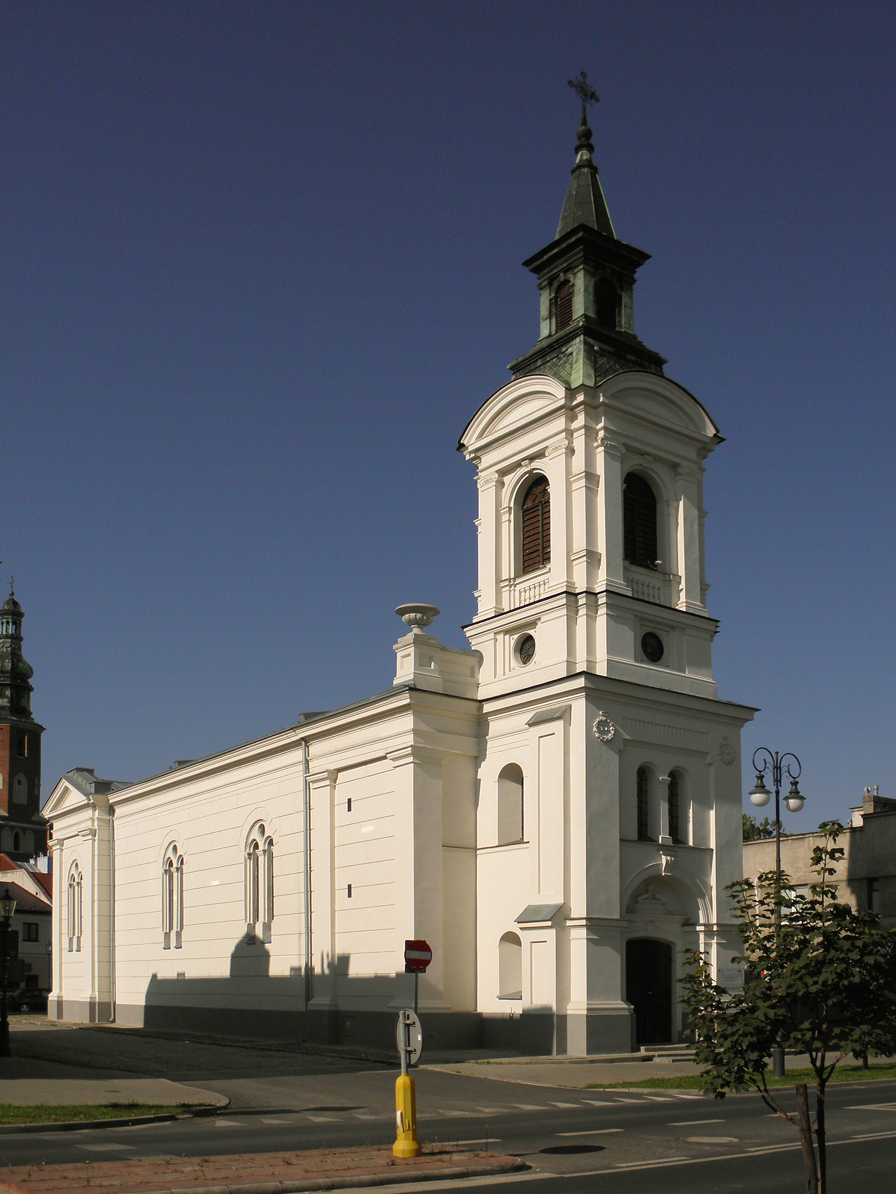 Radom - kościół ewangelicko-augsburski.